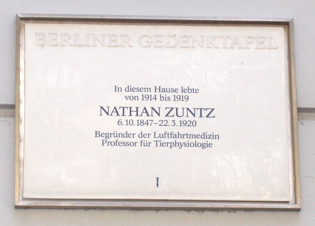 Gedenktafel für Nathan Zuntz, Bleibtreustrasse 38, Berlin